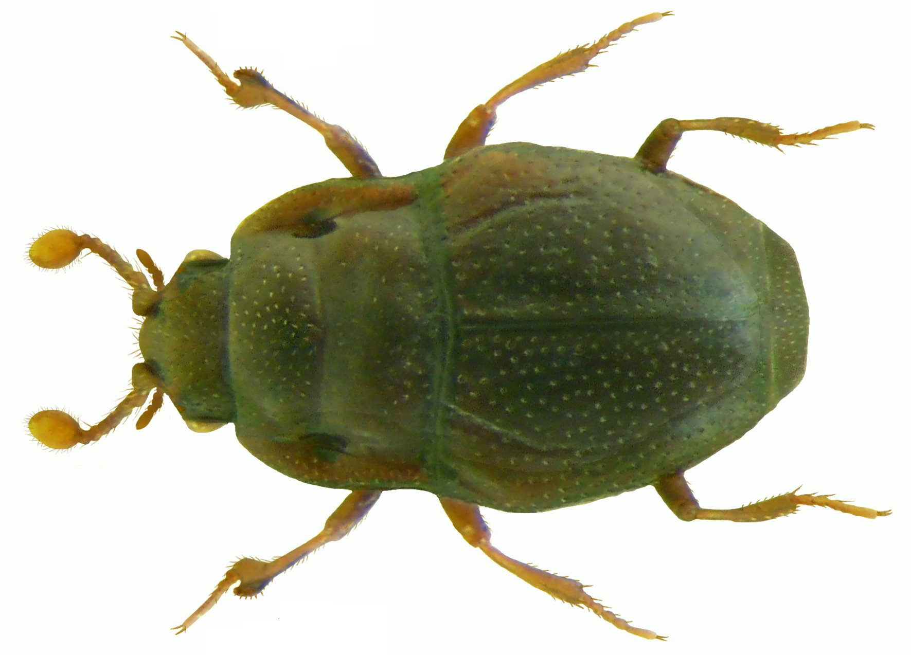 Familie: Histeridae Grösse: 1- 1,5 mm Verbreitung: Europa Ökologie: in Mulm und unter Rinde Fundort: Germania, Sachsen, Wildbach leg.det. A.Weigel, 1998 Foto: U.Schmidt, 2008